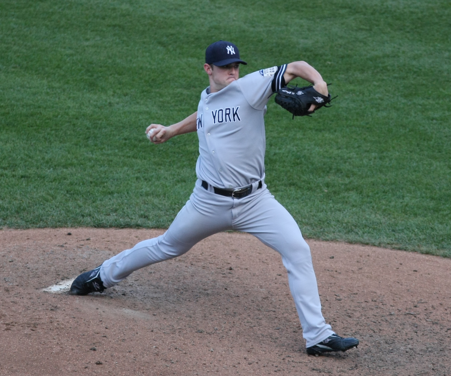 David Robertson